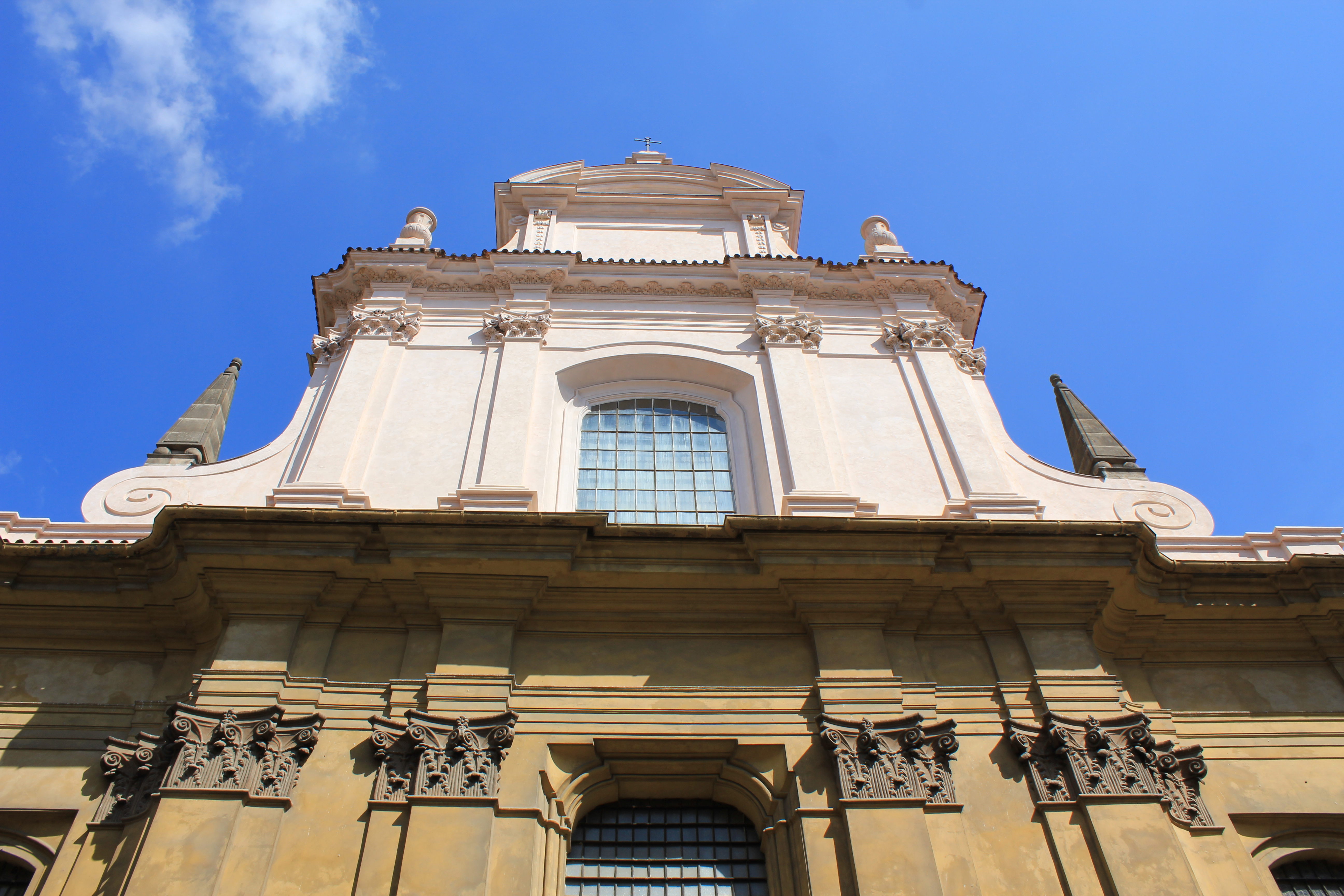 Vår frue av uopphørlig hjelp - kirken i Nerudova - gata